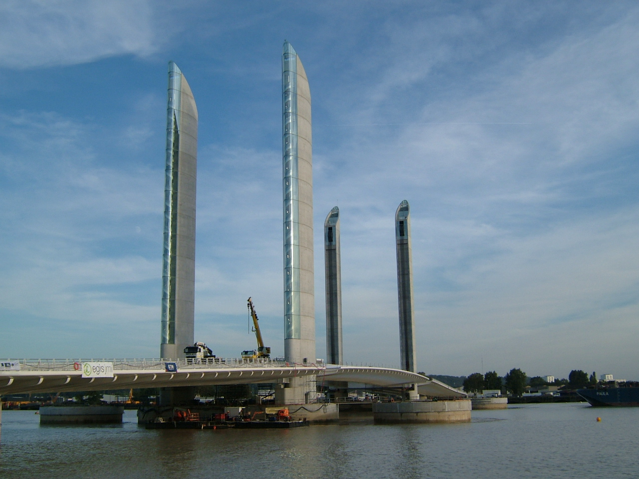 Bordeaux, Gironde (France); pont levant en chantier au lendemain de la pose de la travée centrale (24/10/2012).